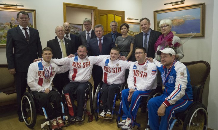 По инициативе полномочного представителя Президента Российской Федерации в Крымском федеральном округе Олега Белавенцева для севастопольских спортсменов-паралимпийцев были изготовлены механические кресла-коляски по индивидуальному заказу. Новые индивидуальные средства реабилитации получили пять севастопольских спортсменов-паралимпийцев: Эскендер Мустафаев, Андрей Граничка, Илья Журавлев, Роман Крамерцель и Дмитрий Крыжановский. Трое из них - в Сборной России, которая поедет на XV летние Паралимпийские игры.